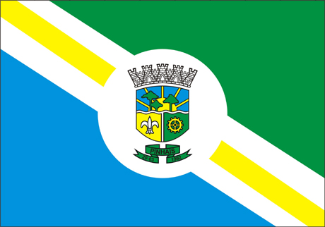 Bandeira de Pinhais, município do Paraná, Brasil.